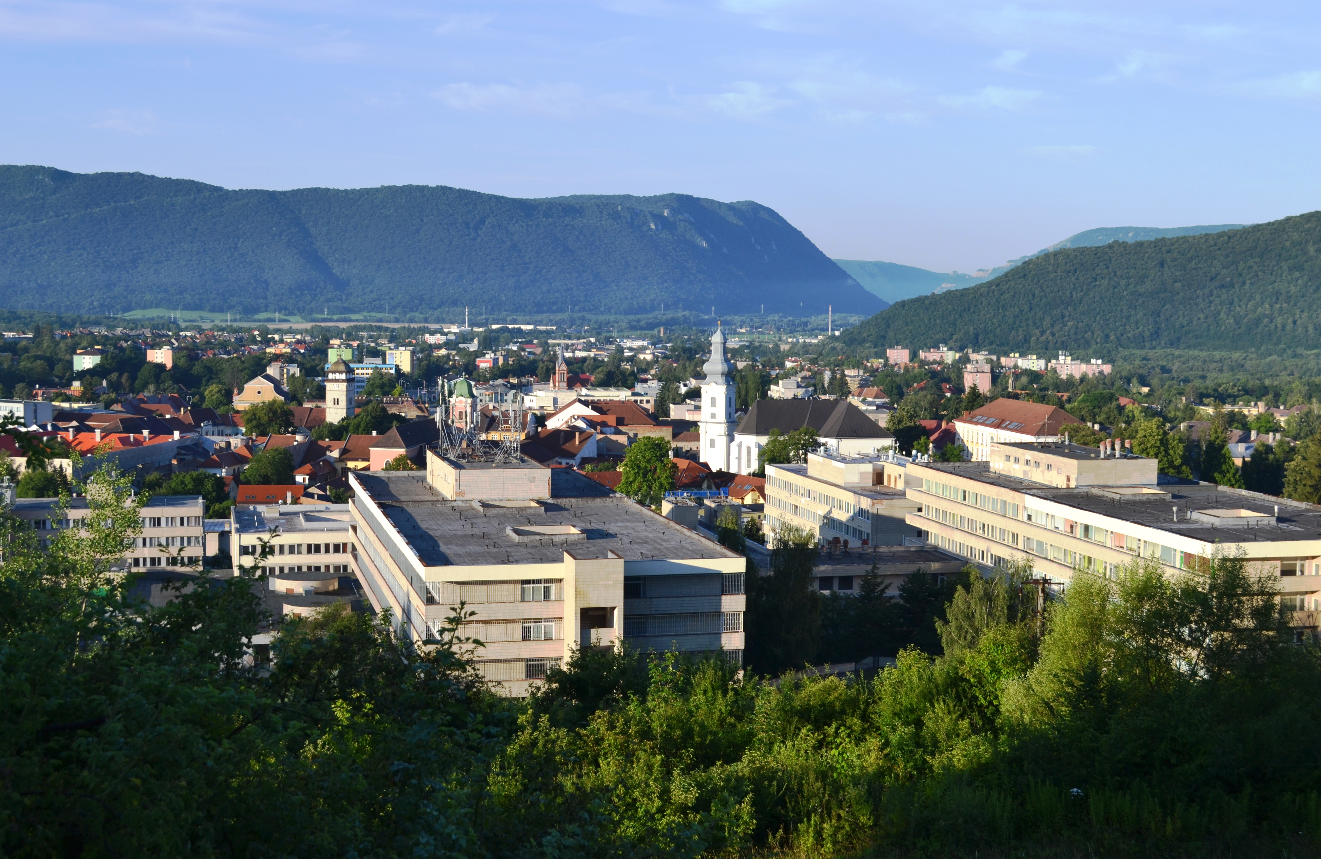 Mesto Rožňava